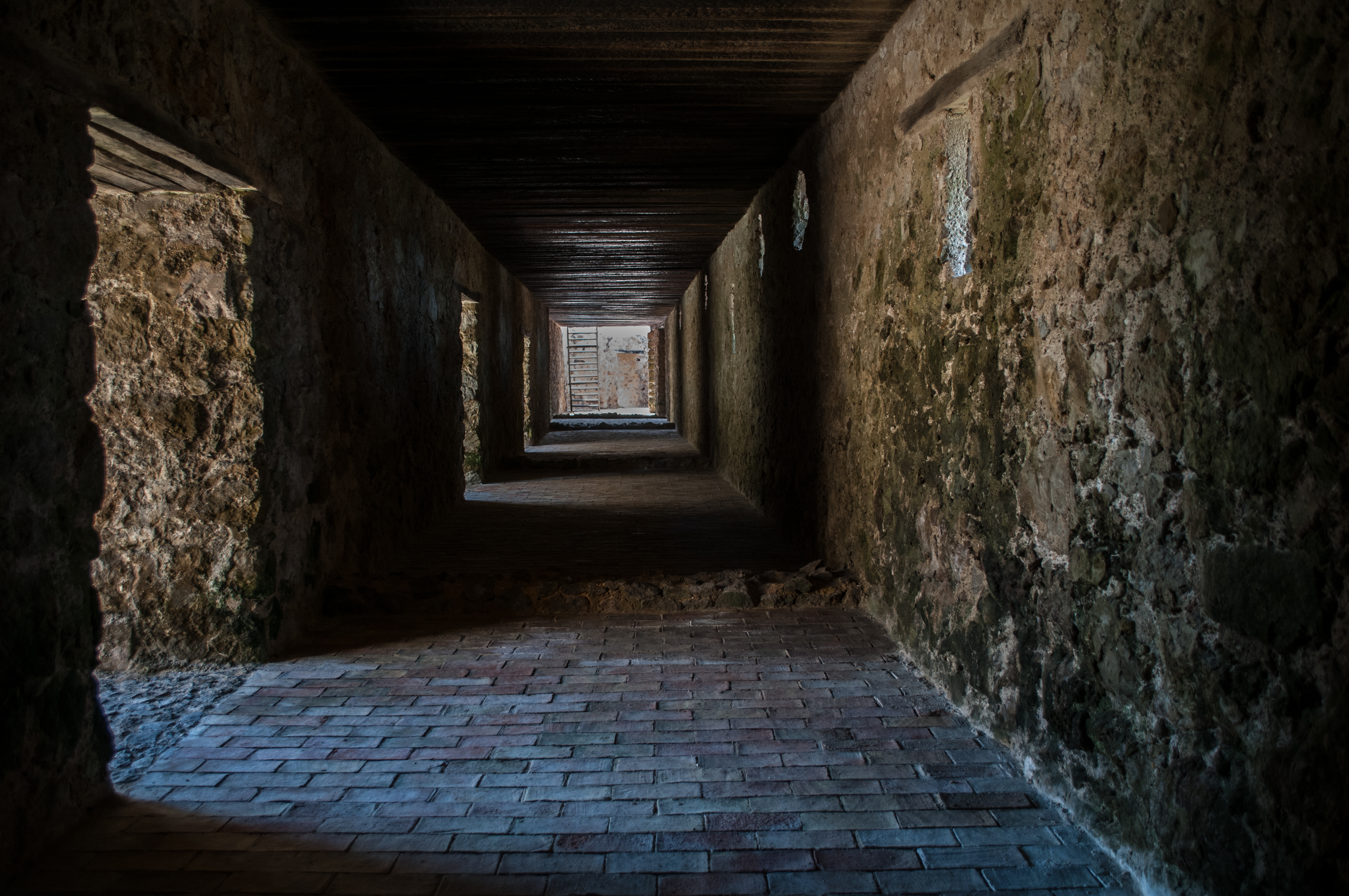 Calabozos en el Castillo de San Carlos de la Barra en Isla de San Carlos